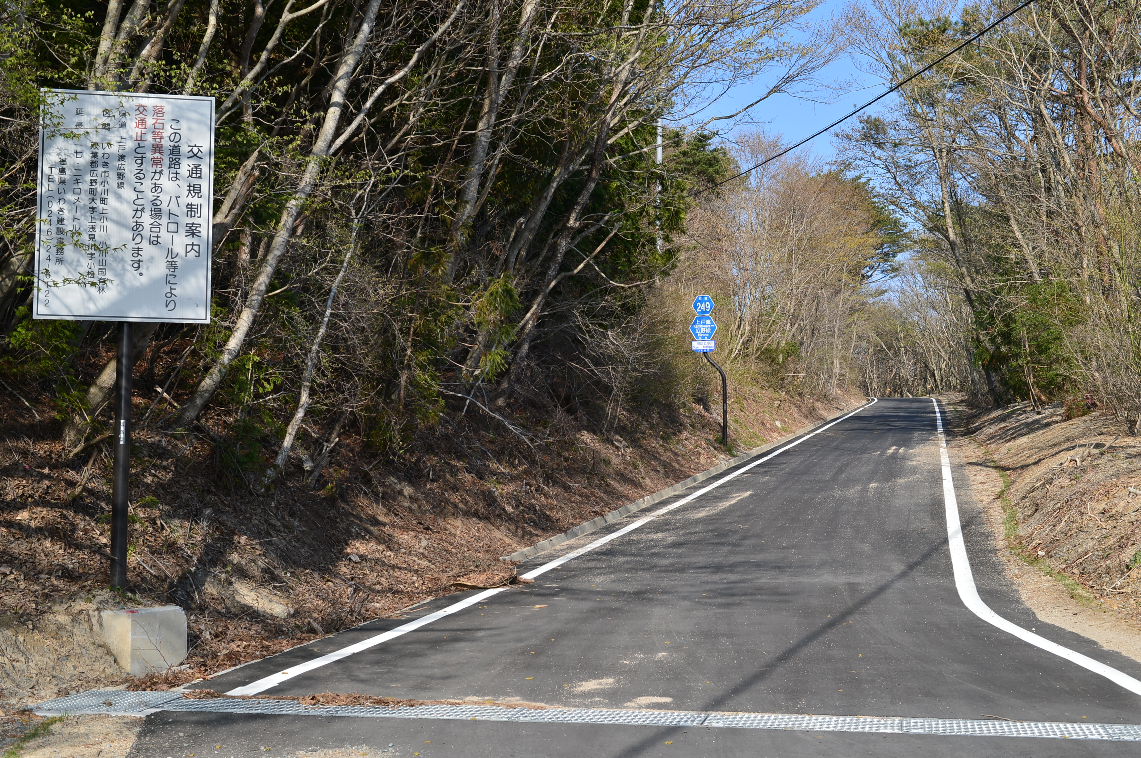 福島県道249号上渡渡広野線（いわき市小川町上小川）